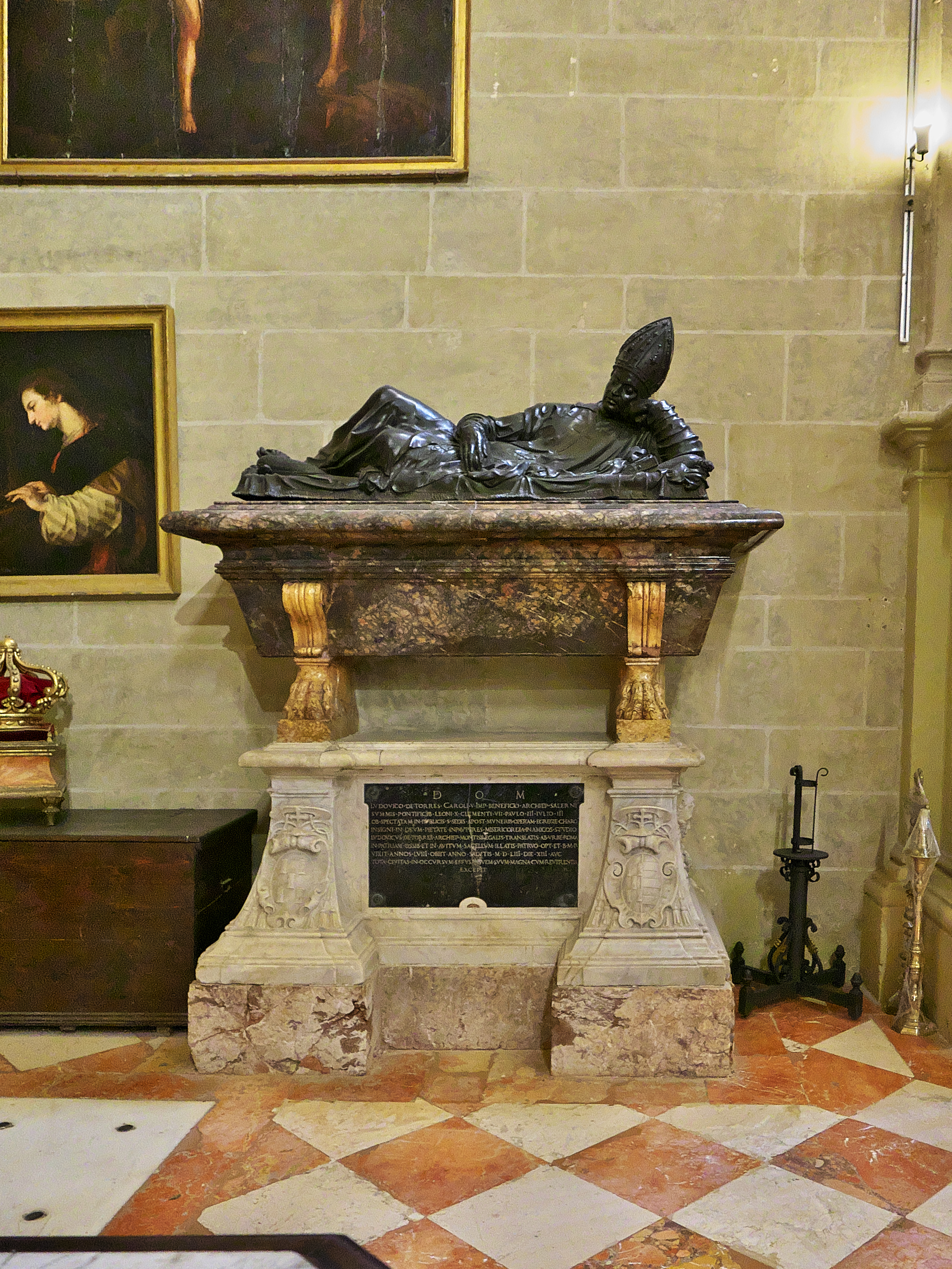 Capilla de San Francisco de Asís, Catedral de Málaga. Sepulcro de Luis de Torres (Málaga 1495-Roma 1553), nombrado arzobispo de Salerno (1548) por el papa Paulo III a petición de Carlos I. Fue enterrado en la iglesia de Santa Caterina dei Funari y por testamento, trasladaron sus restos a la Catedral de Málaga. El sepulcro es obra de Giovanni Antonio Dosio (1550-1599) con figura yacente en bronce de Guglielmo della Porta.